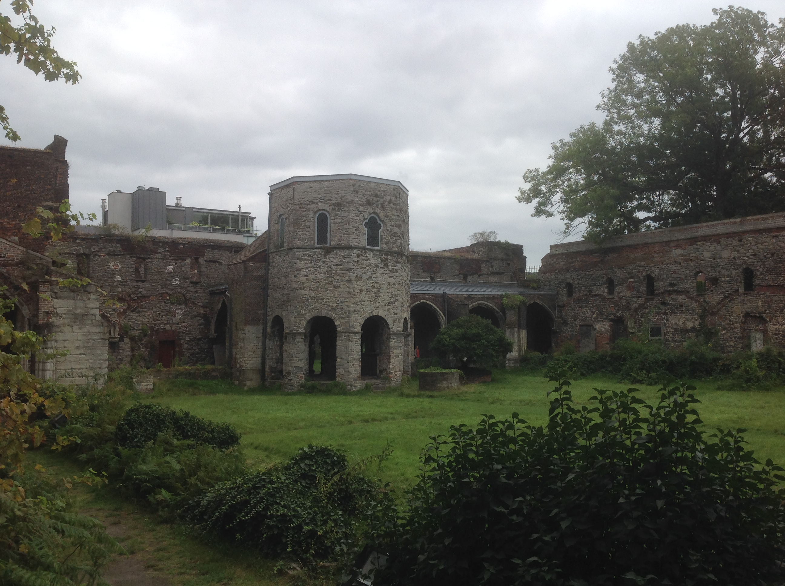 Prise de vue depuis le cloître de l'ancienne abbaye Saint-Bavon à Gand (Belgique). Photo de 2016